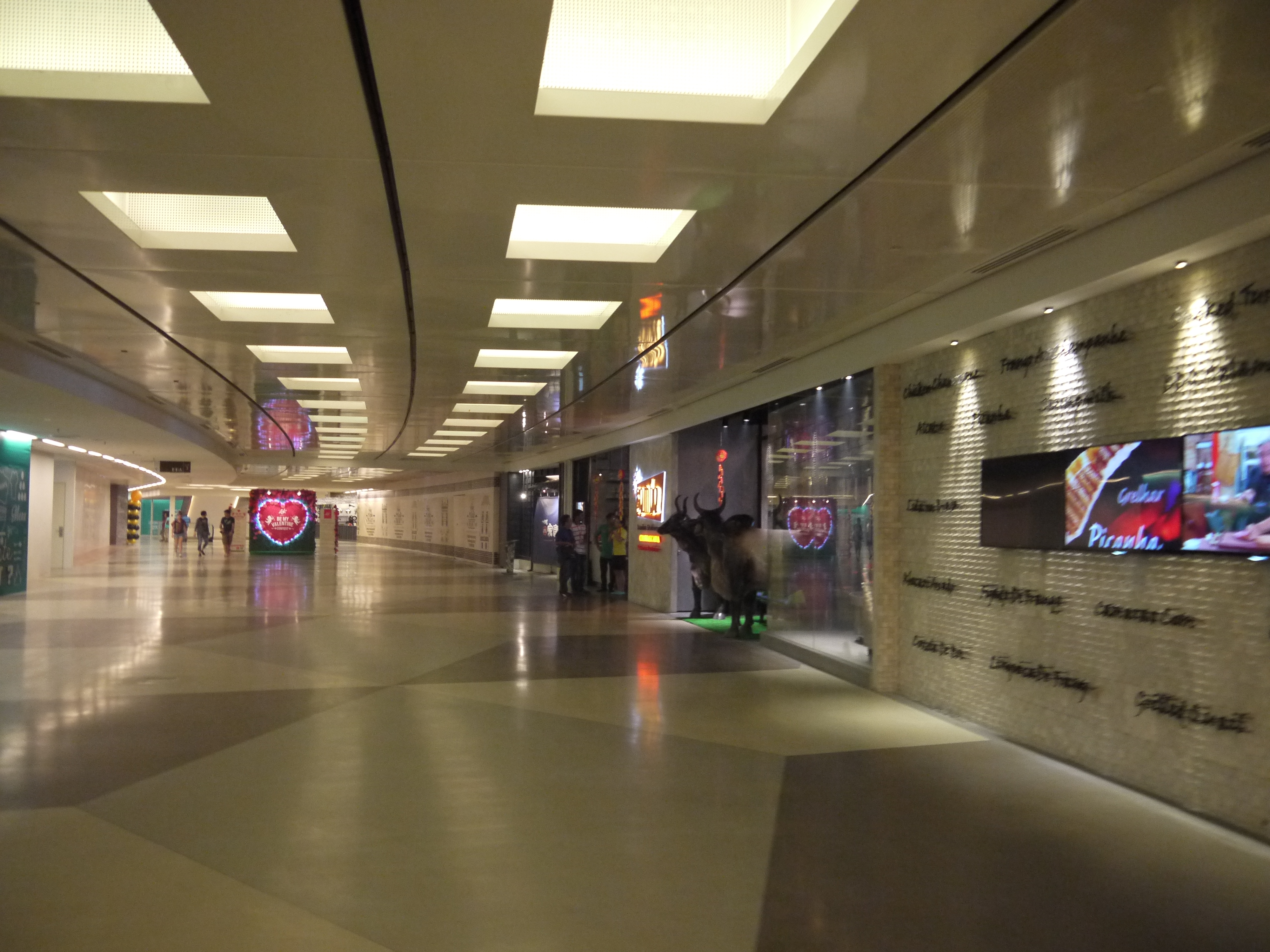 Avenue K Floor 4